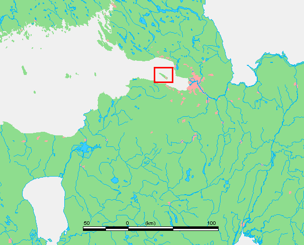 Kronstadt / Kotlin Island